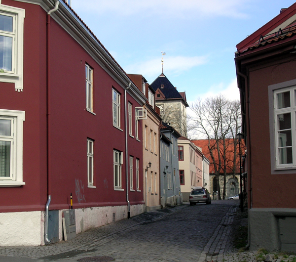 St. Jørgensveita, Trondheim.